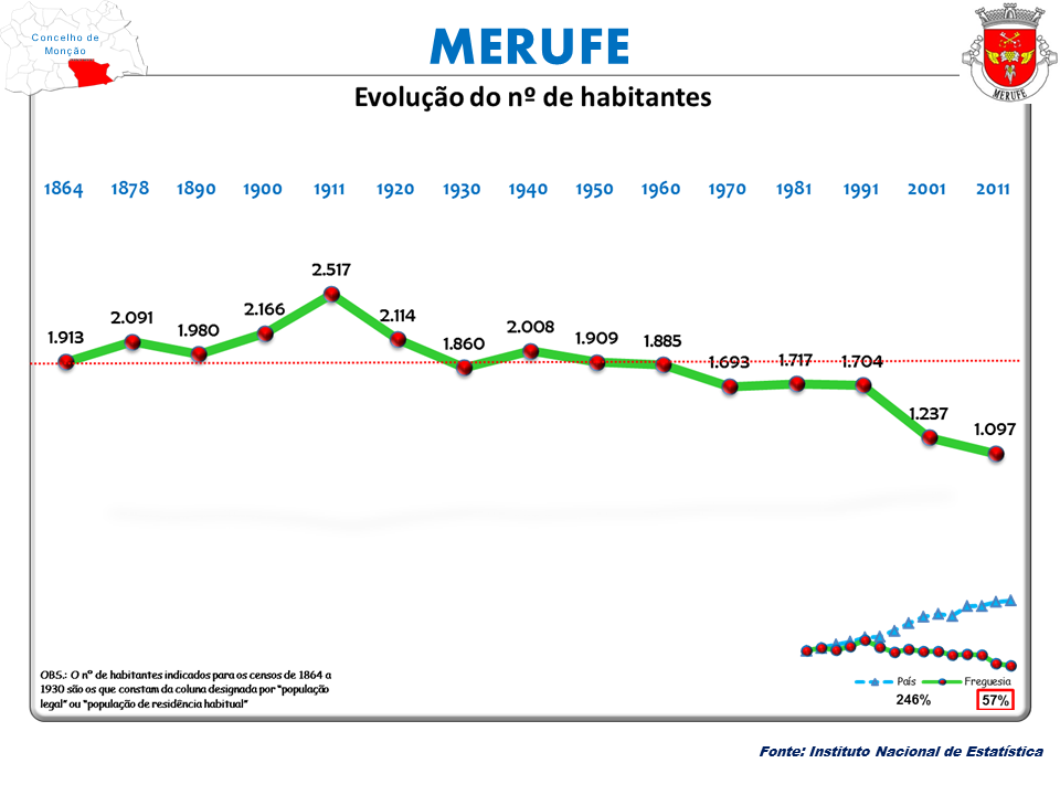 Censos 1864/2011